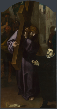 Francisco Ribalta, Visión del padre Francisco Jerónimo Simón, óleo sobre lienzo, 211 x 111 cm., Londres, National Gallery.